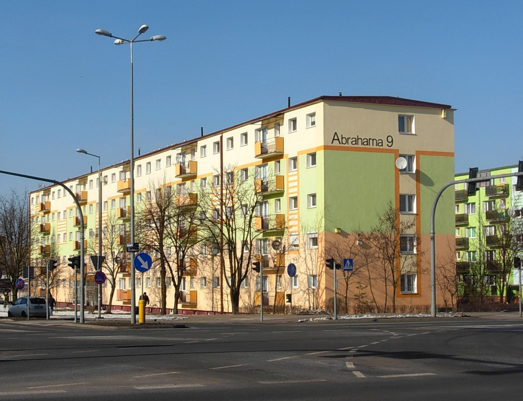 Zabudowa na osiedlu Błonie w Bydgoszczy